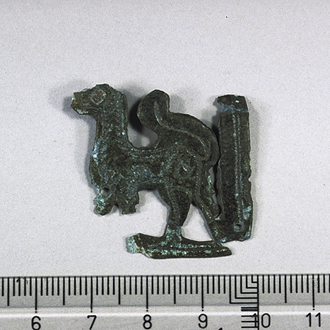 Bronsbeslag, romansk stil. Tölö 173